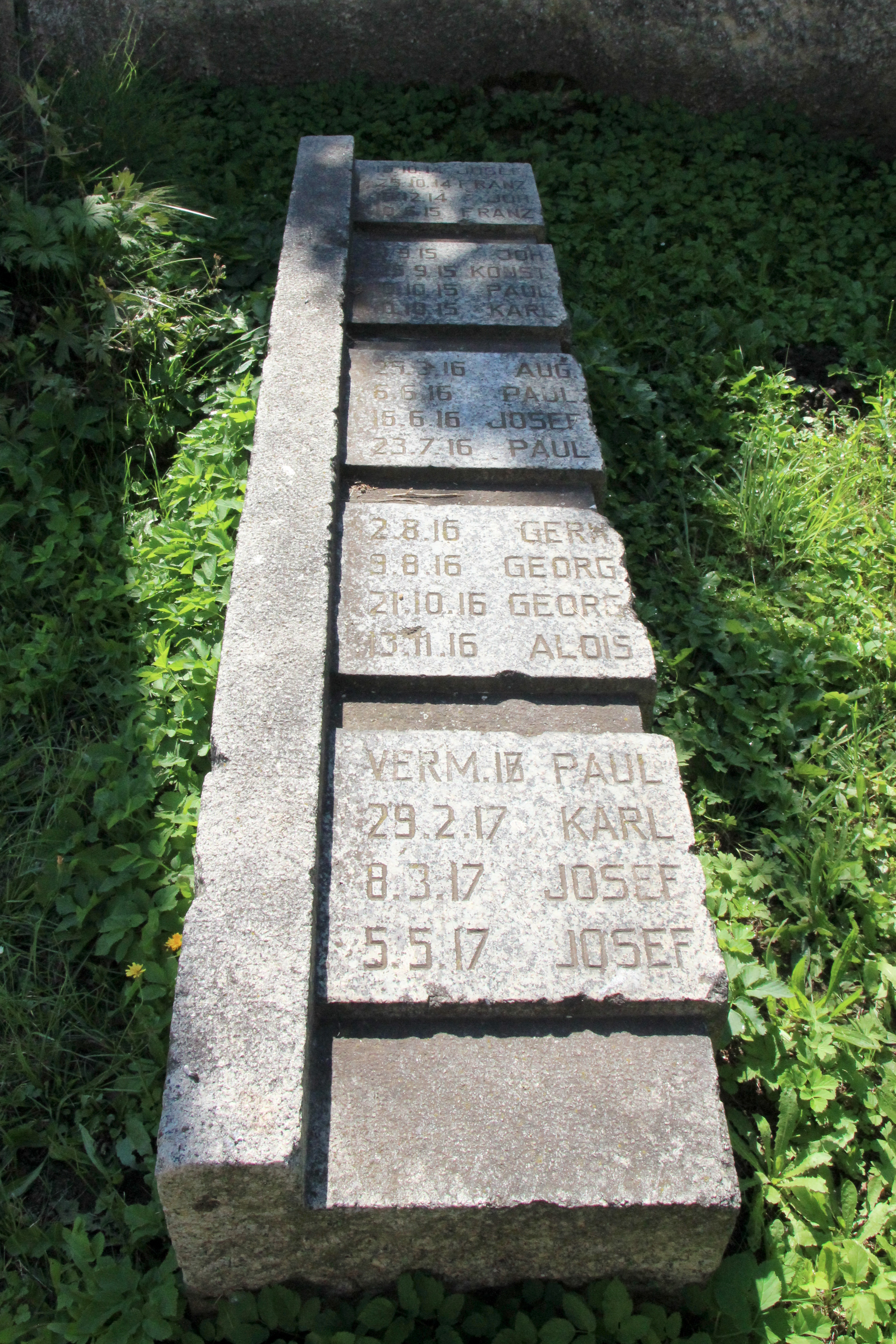 Przełęk – wieś w Polsce położona w województwie opolskim, w powiecie nyskim, w gminie Nysa.